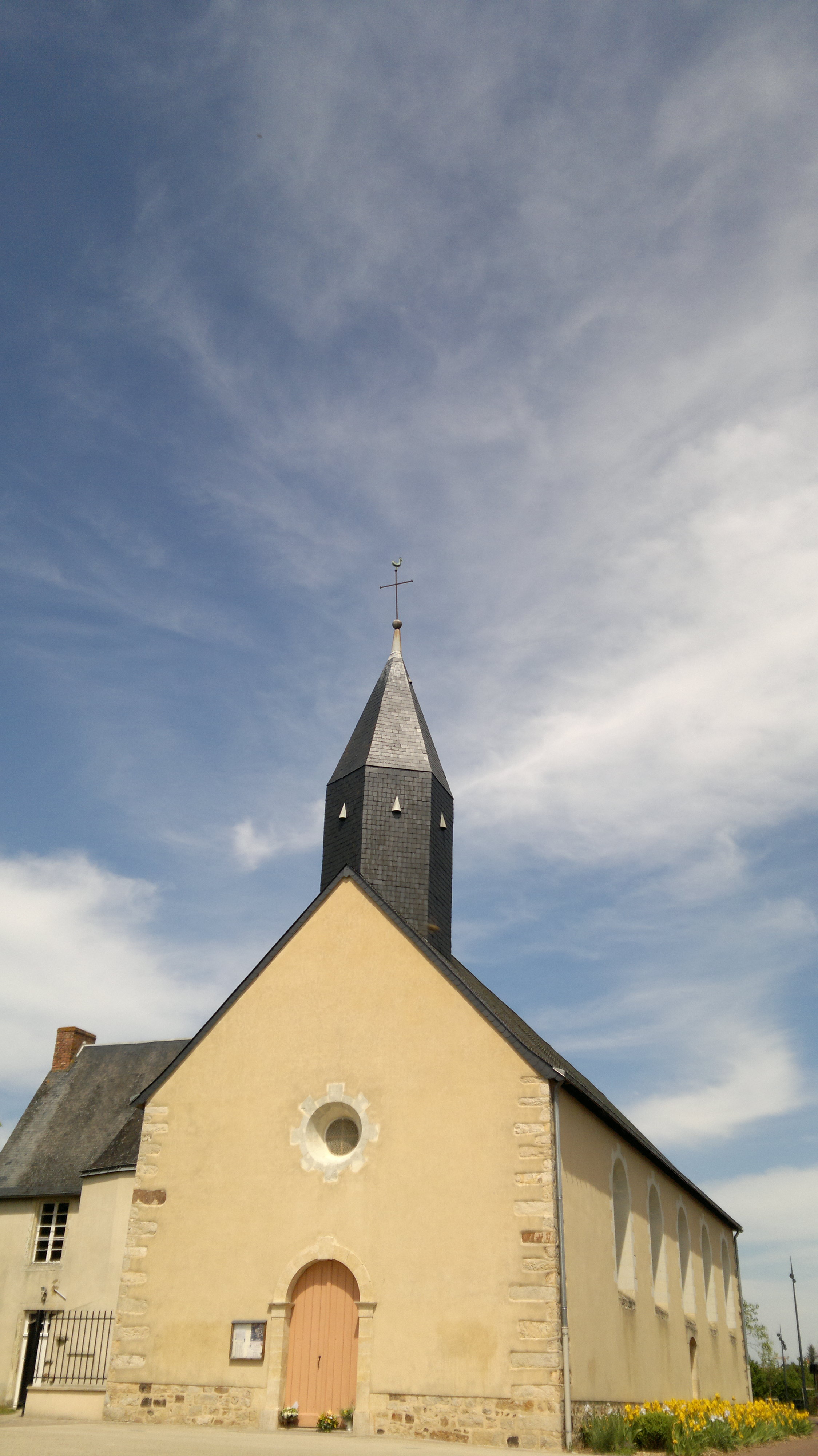 L'église Notre-Dame du XVIIIe siècle. Rouillon est une commune française, située dans le département de la Sarthe et la région Pays de la Loire.